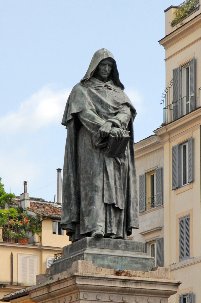 La statue de Giordano Bruno sur le Campo dei Fiori Cette statue a été érigée en 1889 pour commémorer le supplice du moine Giordano Bruno, brulé vif en 1600 sur cette place après avoir été condamné par l'Inquisition.